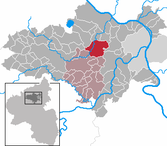 Ochtendung in Rhineland-Palatinate - district Mayen-Koblenz